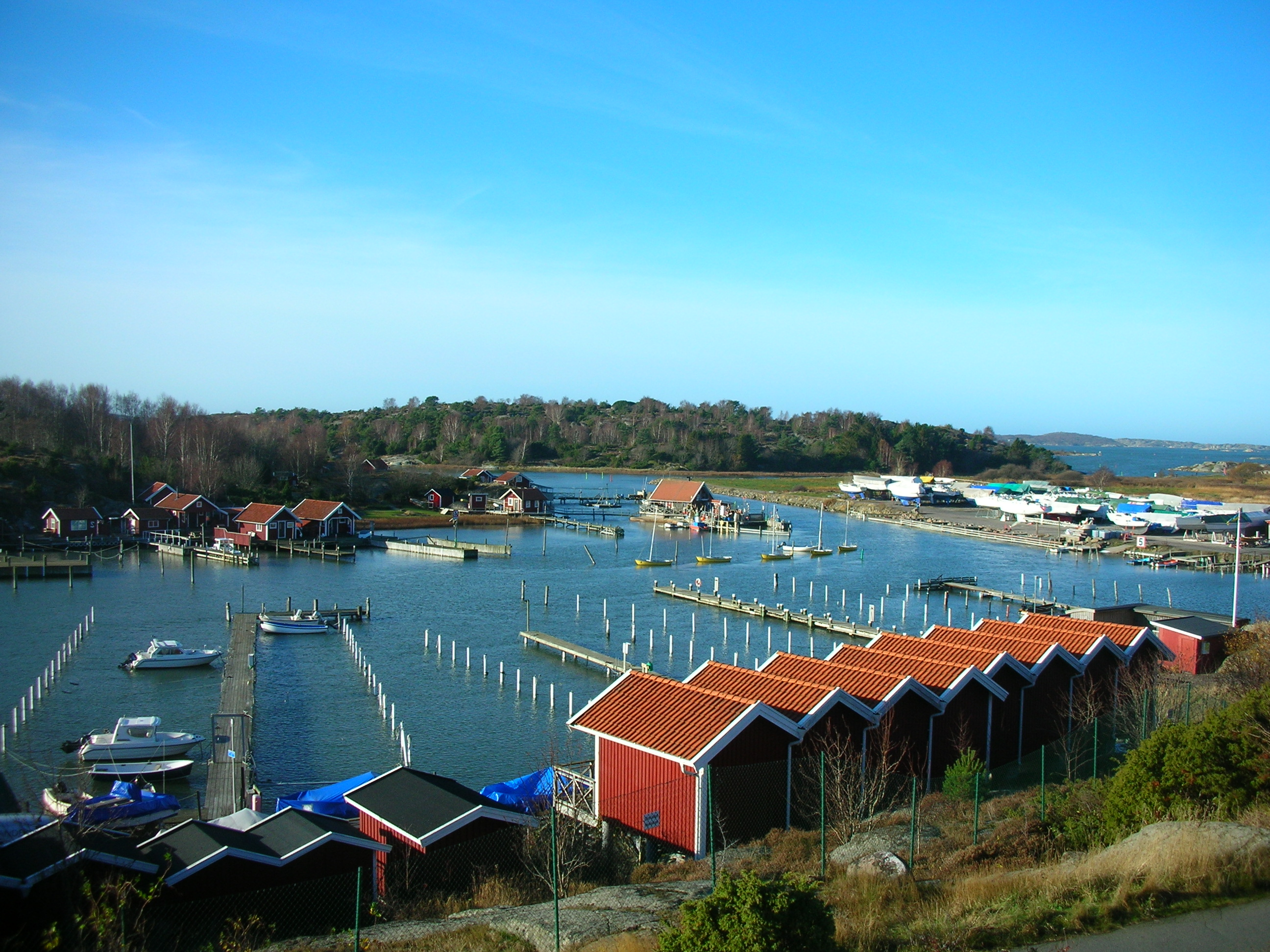 Del av Önnereds båthamn med lilla Rösö rakt fram till vänster och stora Rösö rakt fram. Eskils kanal löper från båthamnen förbi lilla Rösö på vänster sida och svänger sedan höger med stora Rösö på vänster sida.